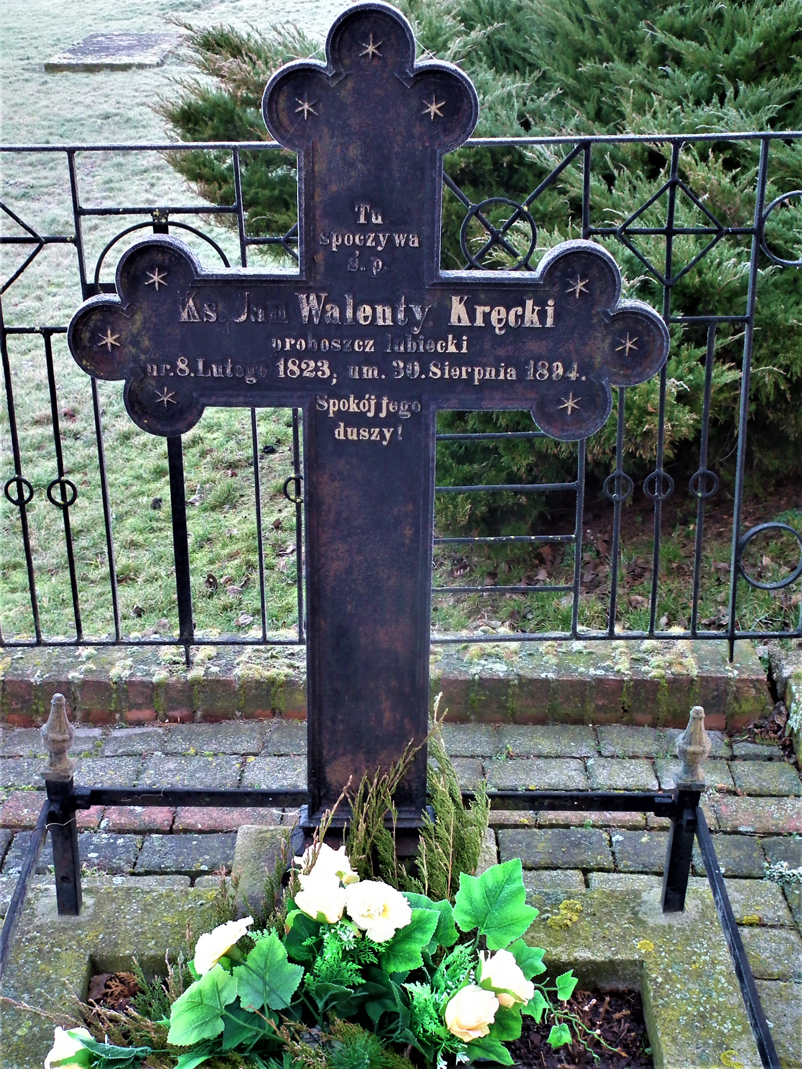 Kościół św. Mateusza w Lubczu.